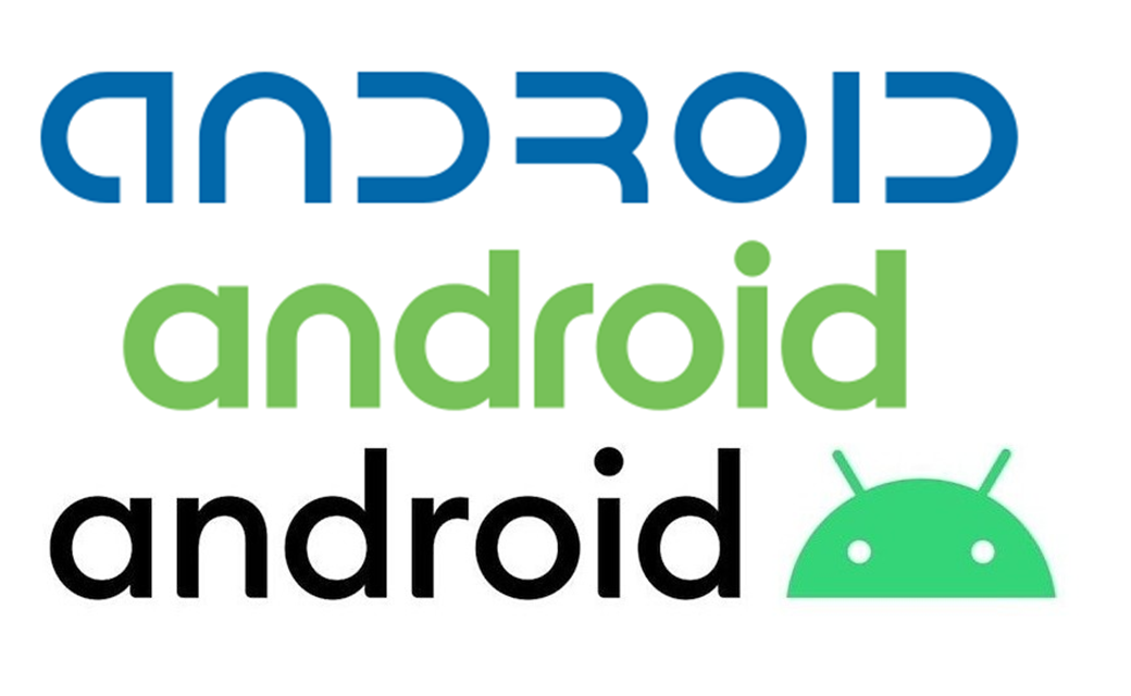 โลโก้แอนดรอยด์ เก่า กลาง ใหม่